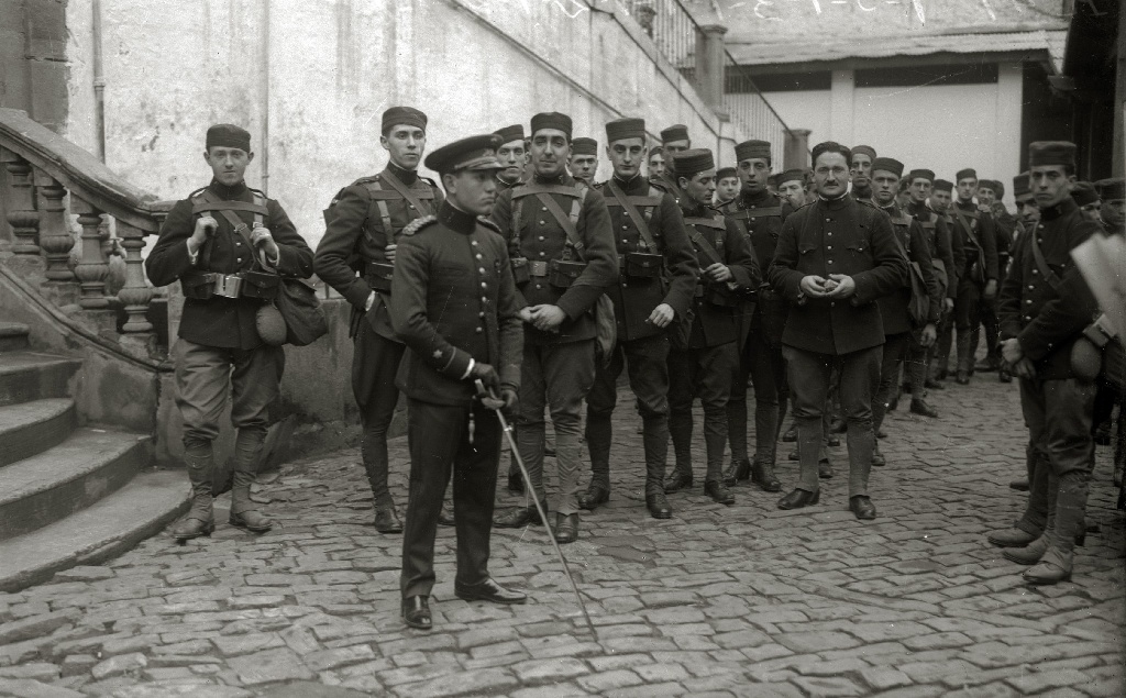 Título original: Soldados en trenes en la estación del Norte con destino a la contienda de África (6/10) Localización: San Sebastián (Guipúzcoa)